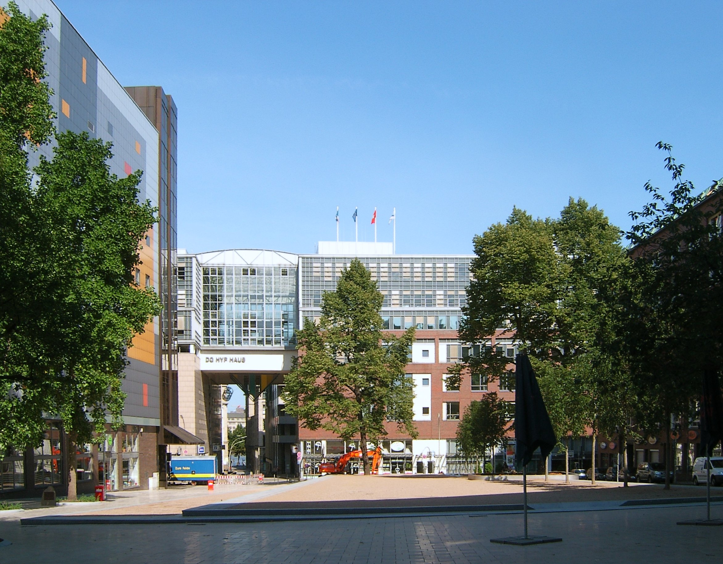 Hamburg, Innenstadt, Gertrudenkirchof